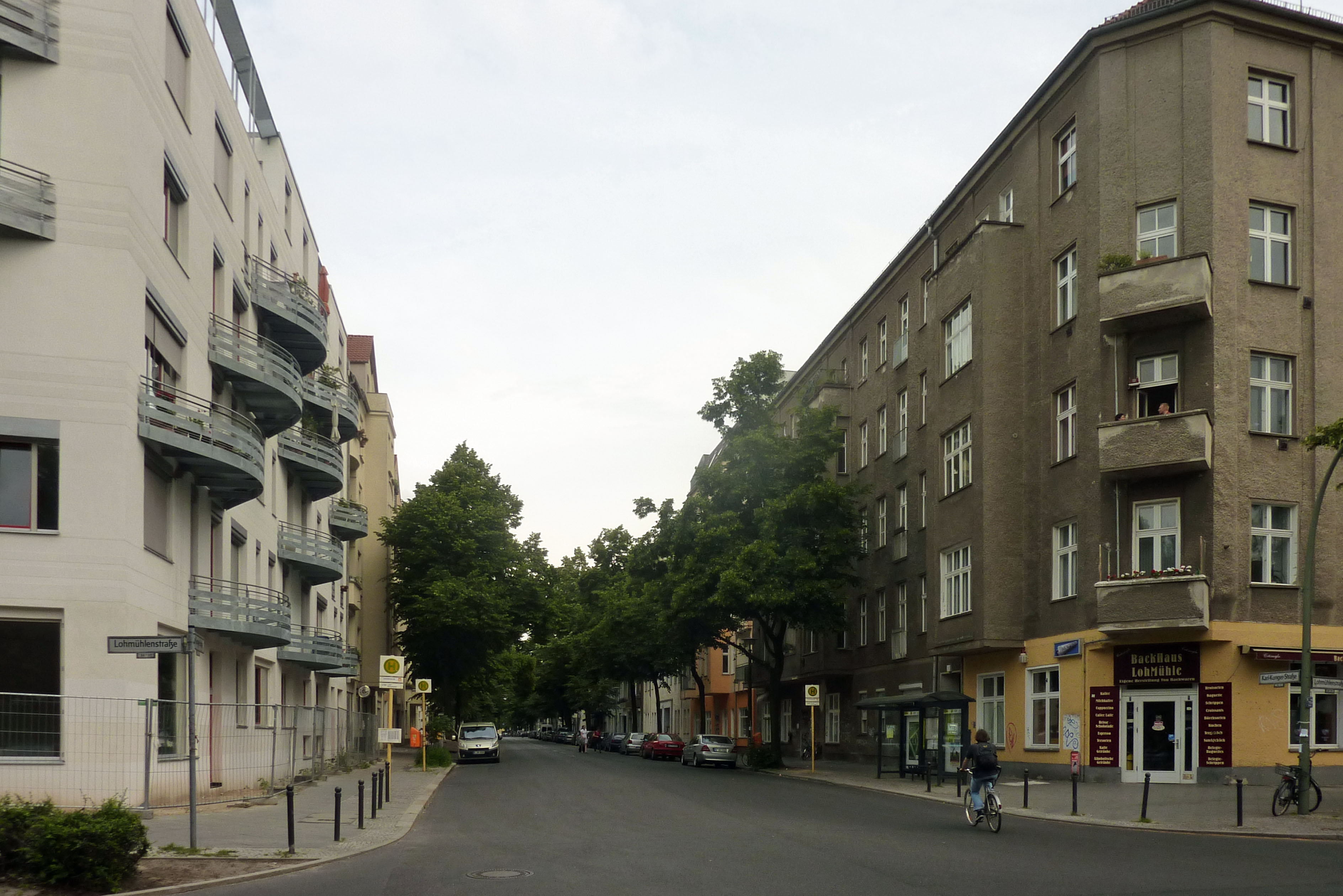 Karl-Kunger-Straße in Berlin-Alt-Treptow. Sicht ab Lohmühlenstraße.